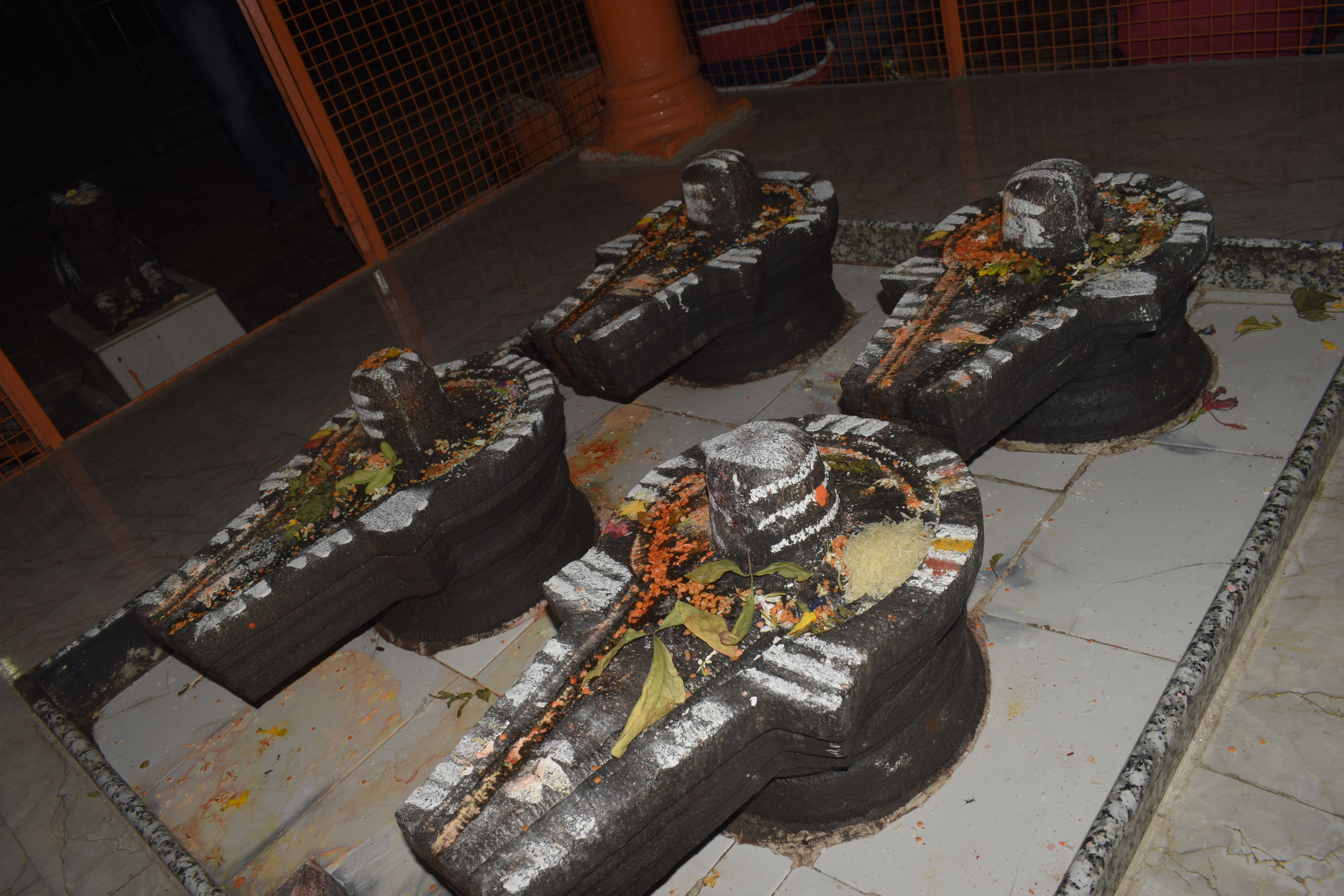 श्री रामेश्वर लिंग